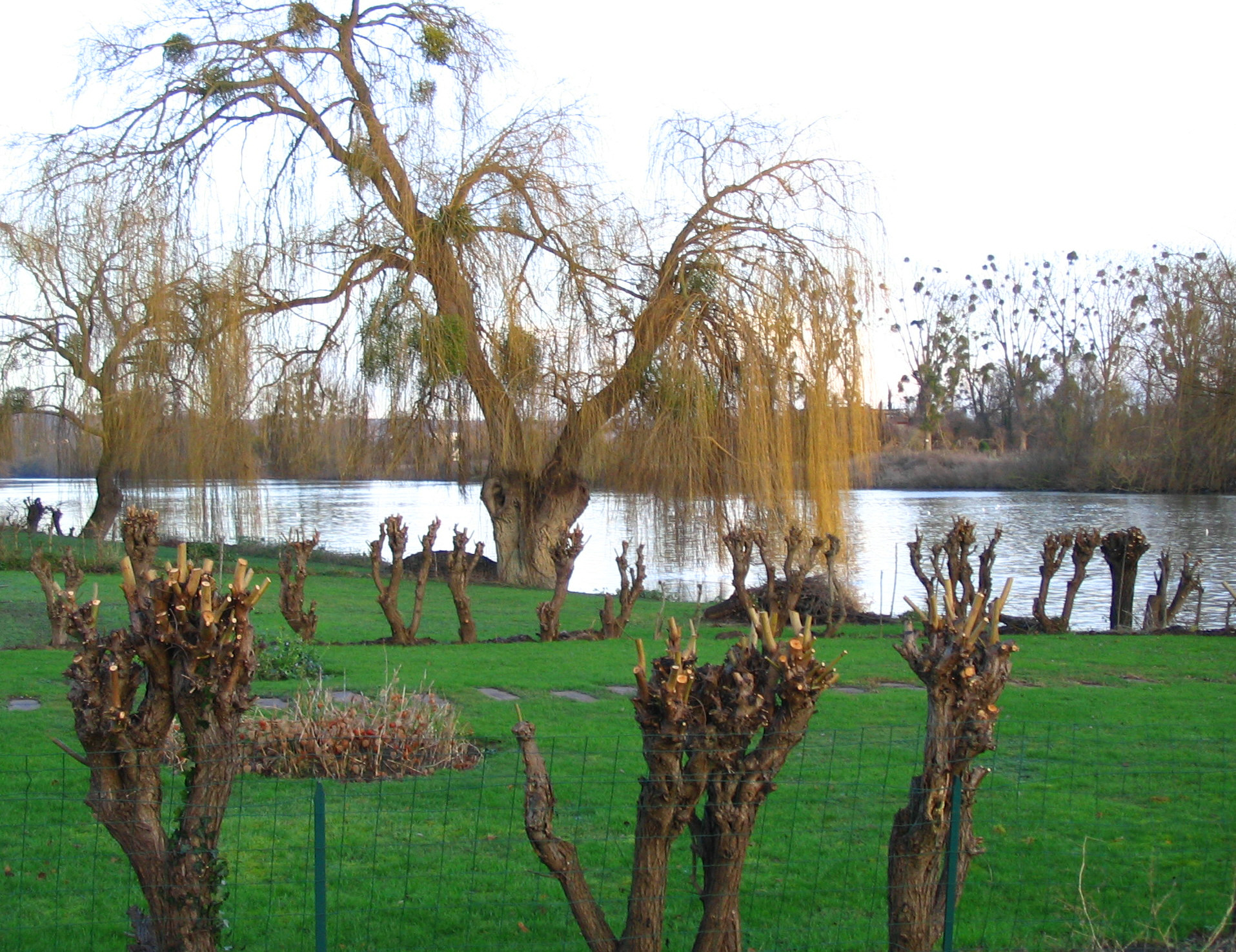 Bords de seine à Mezy-sur-seine - France Auteur/author: P Charpiat 2007